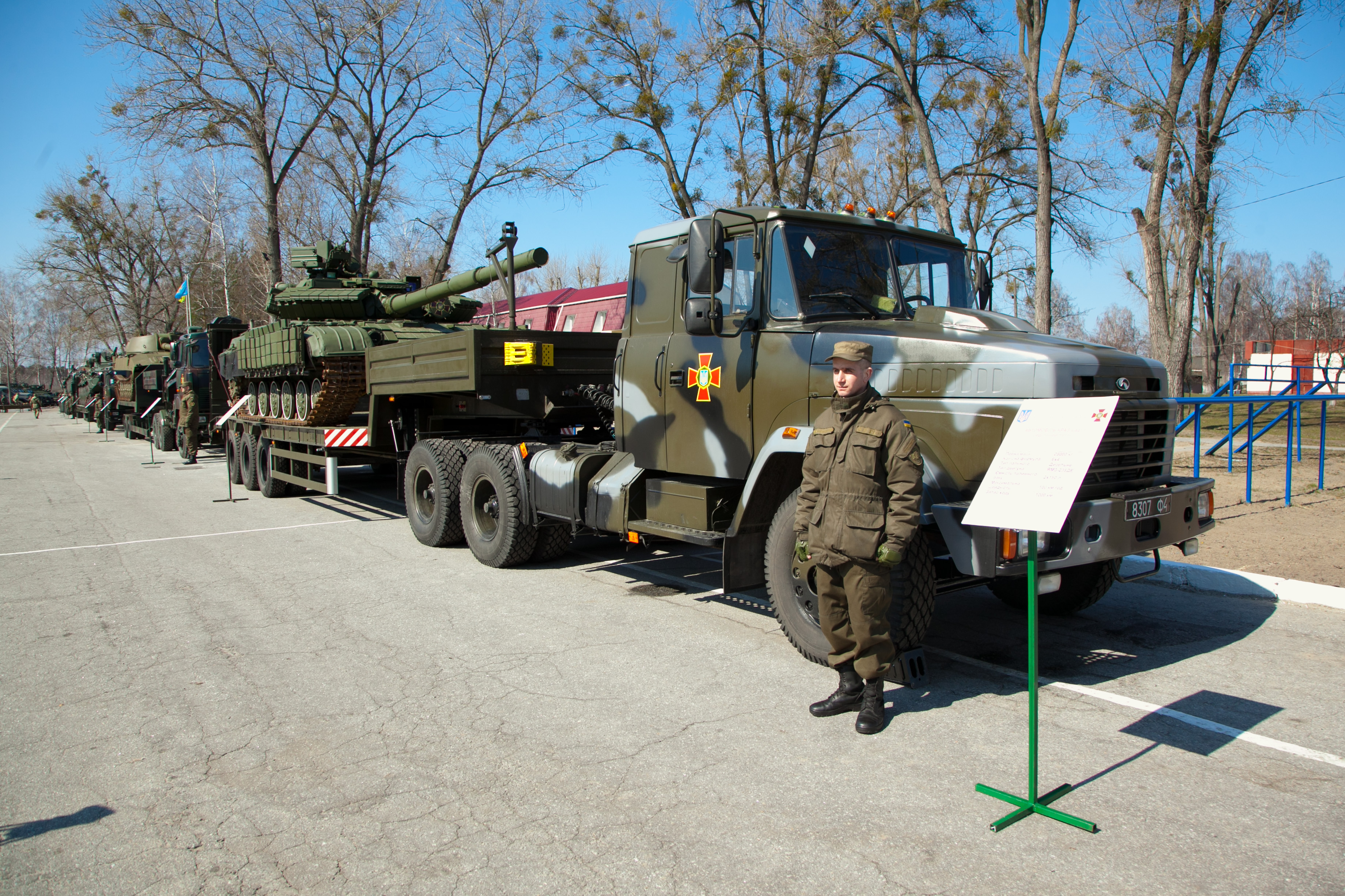 nekrasov_0036